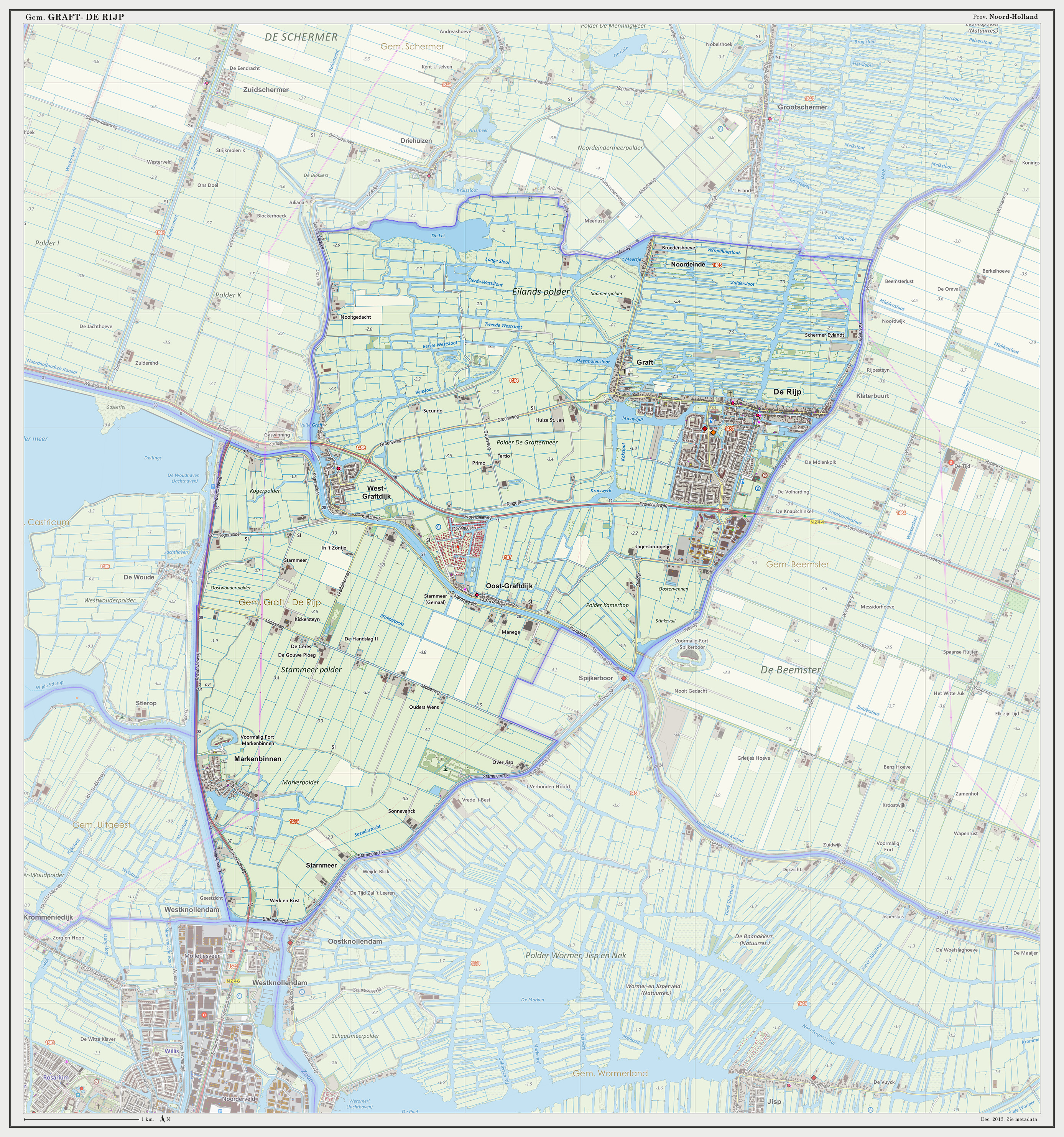 Topografische gemeentekaart. Resolutie: 300 pixels/km. Kaartbeeld samengesteld met de open geodata van de Top10NL en Top25namen (Basisregistratie Topografie, Kadaster 30-nov-2013), o.b.v. Creative Commons BY licentie. Gebouwvlakken uit Open Geodata BAG extract (8-dec-2013). Wegen uit de OpenStreetMap (15-dec-2013). Samenstelling en kleurenschema: Jan-Willem van Aalst, met QGIS2 en Adobe Photoshop. Zie ook de Legenda.